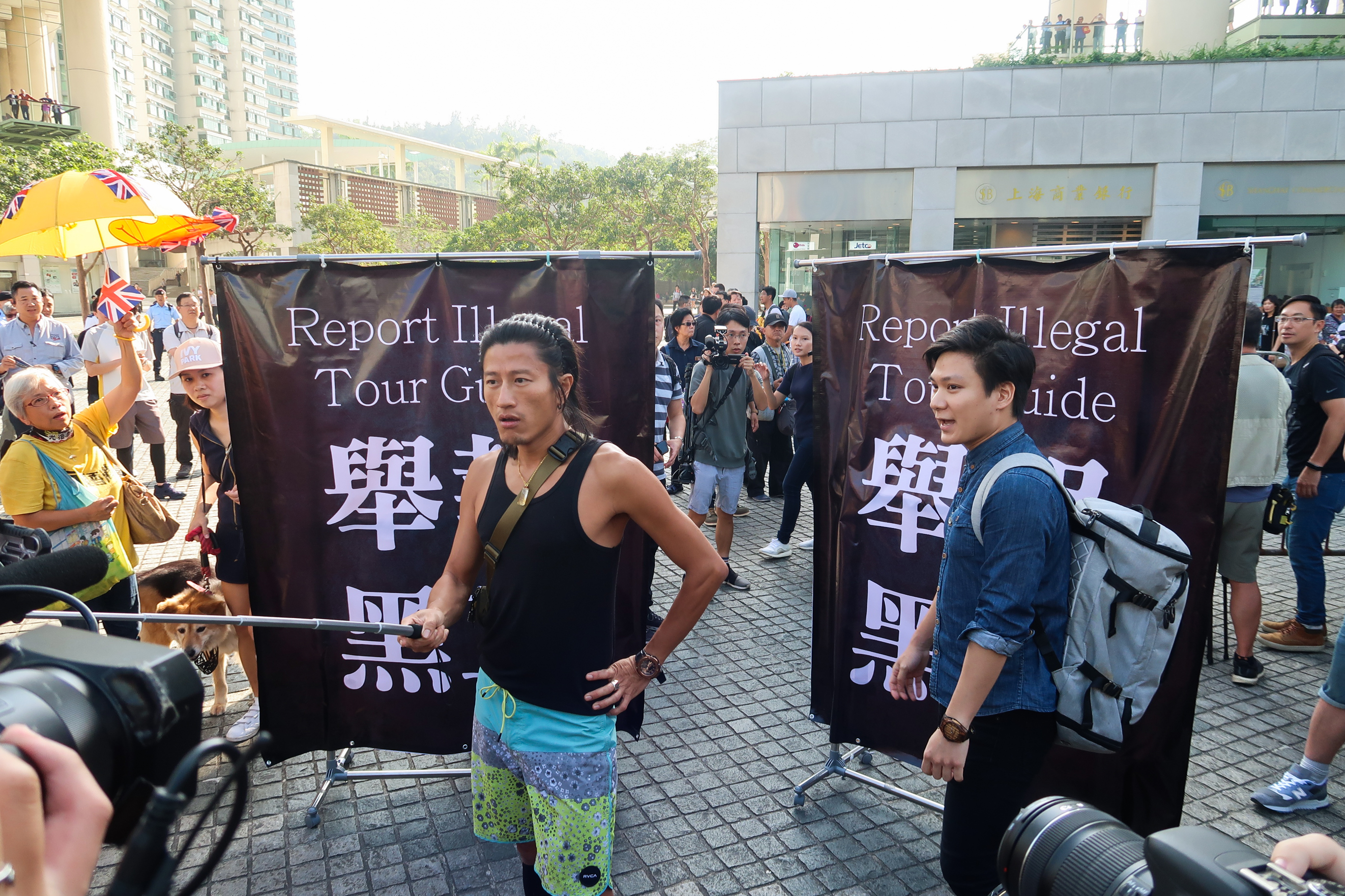 Reclaim Tung Chung protest